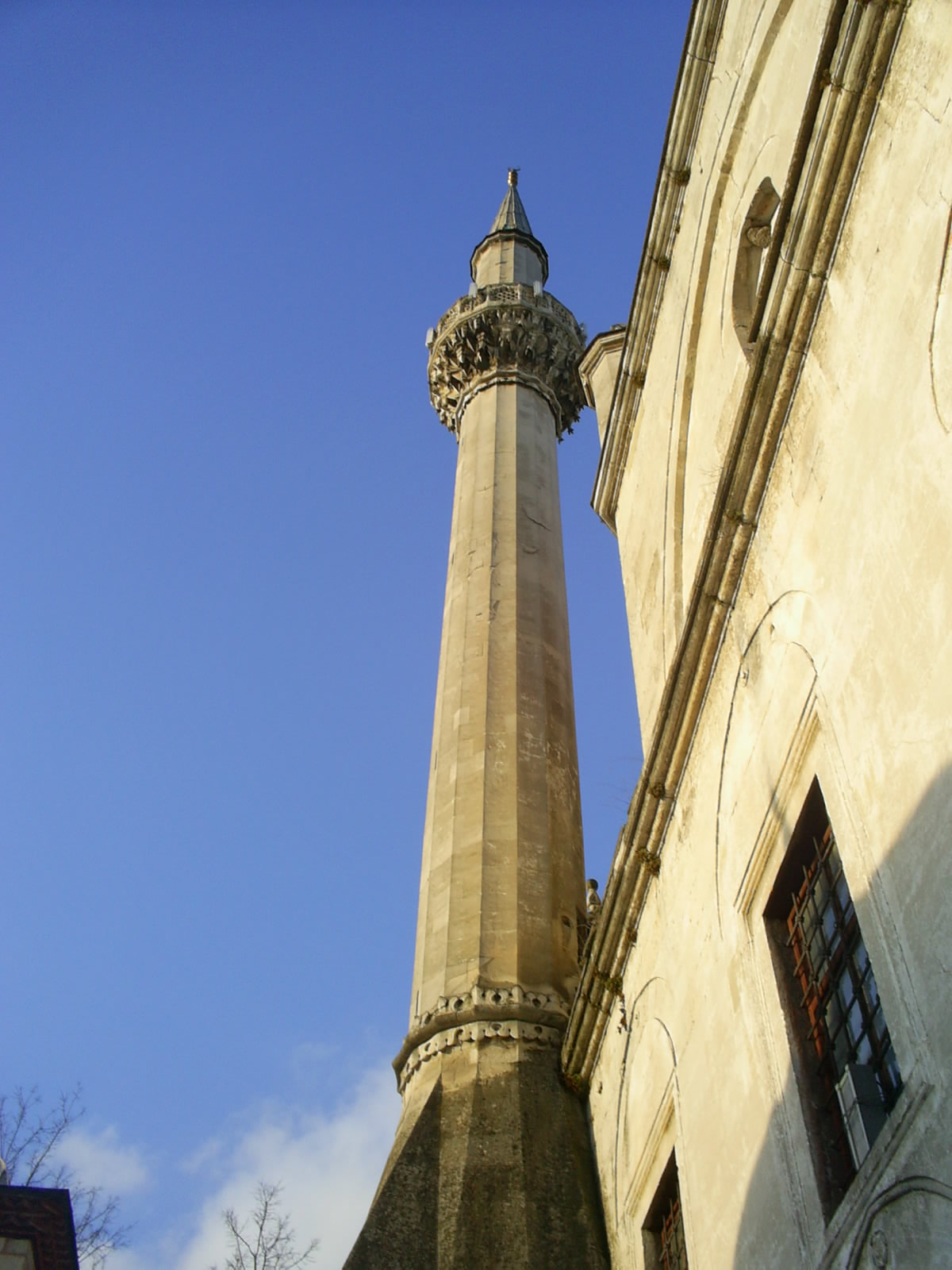 Томбул джамия Шумен © 2006 Свилен Енев